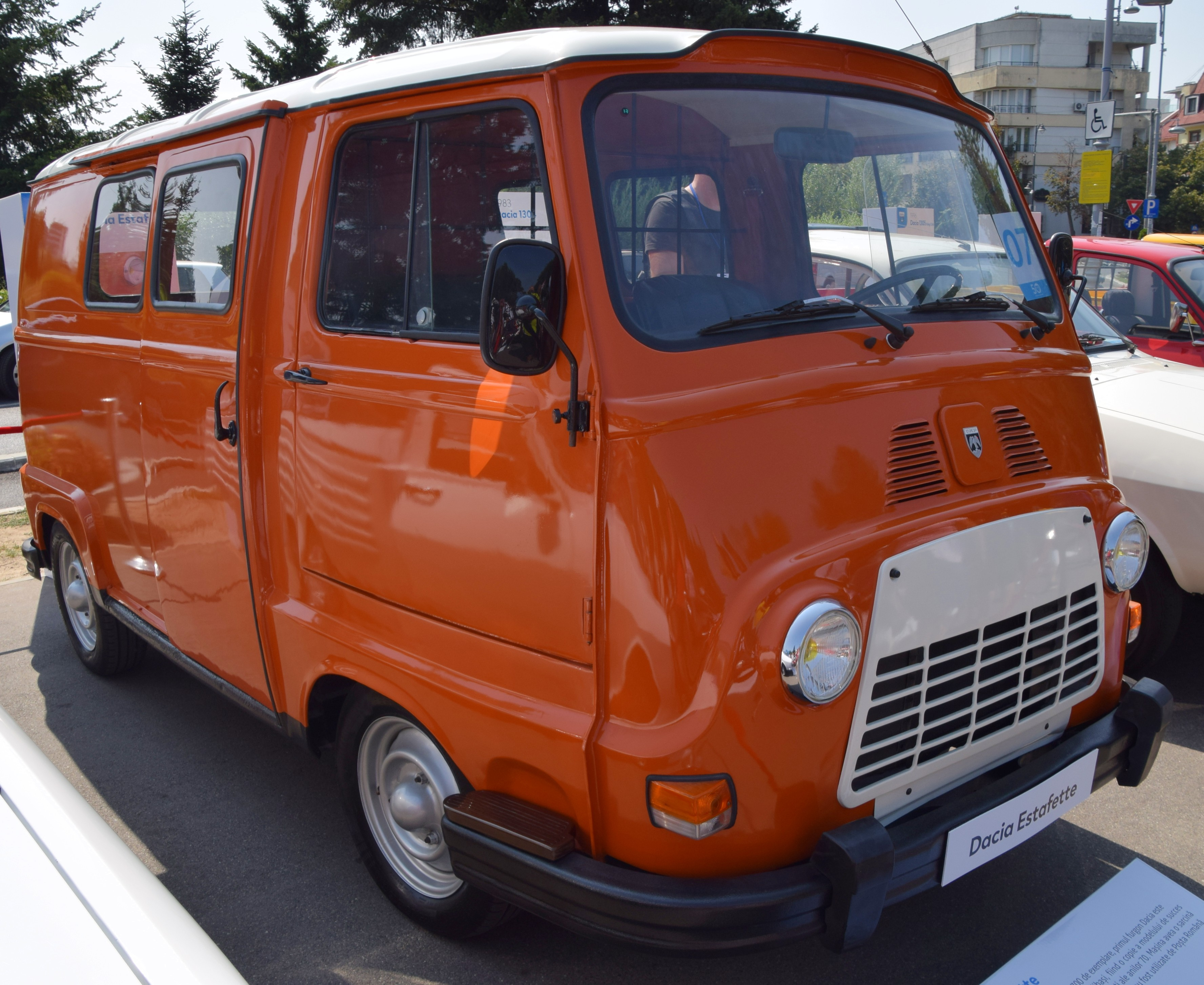 Dacia D6 expusă în Parcul Herăstrău cu ocazia aniversării a 50 de ani de la apariția mărcii Dacia